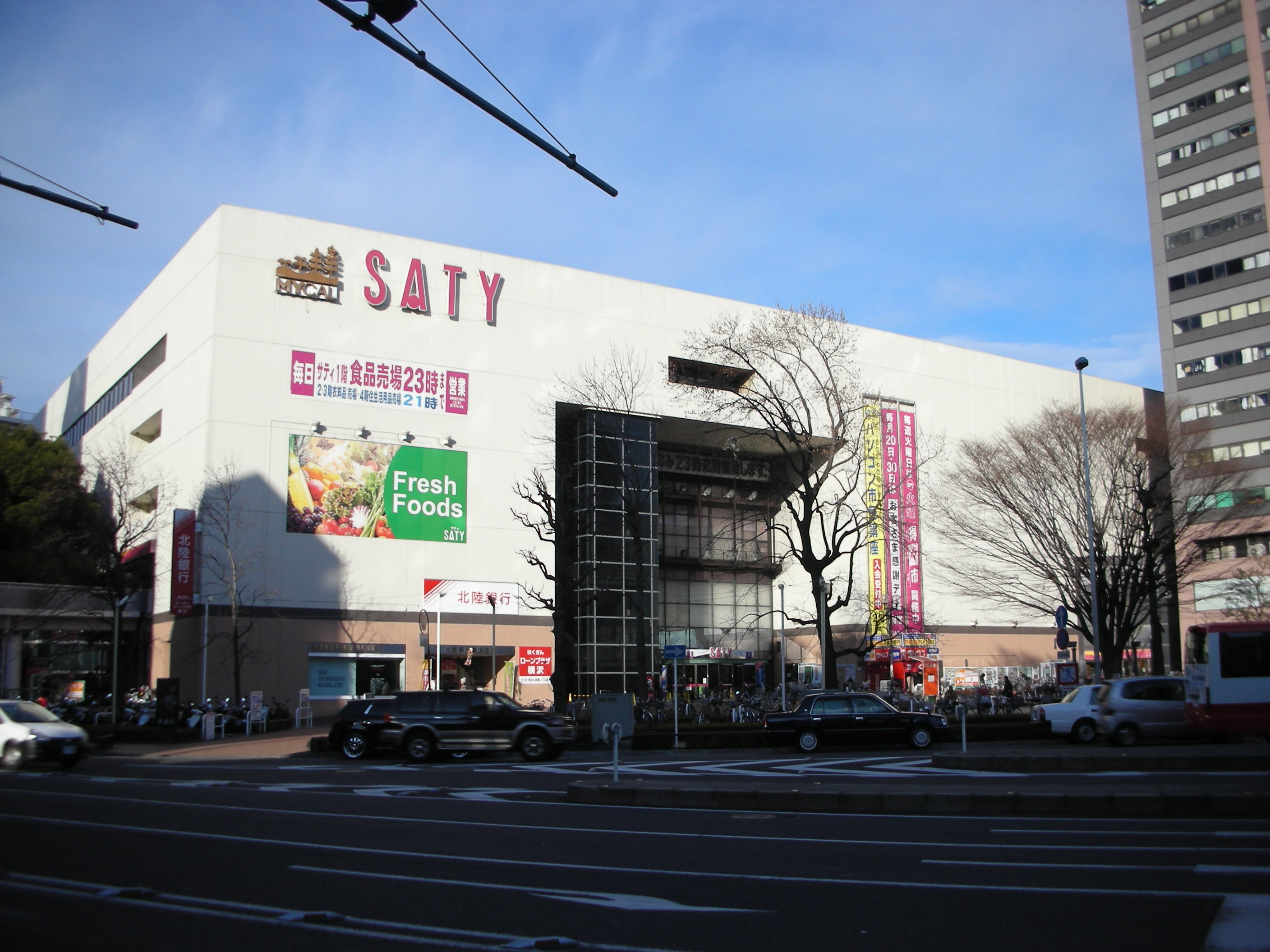 東神奈川サティの外観